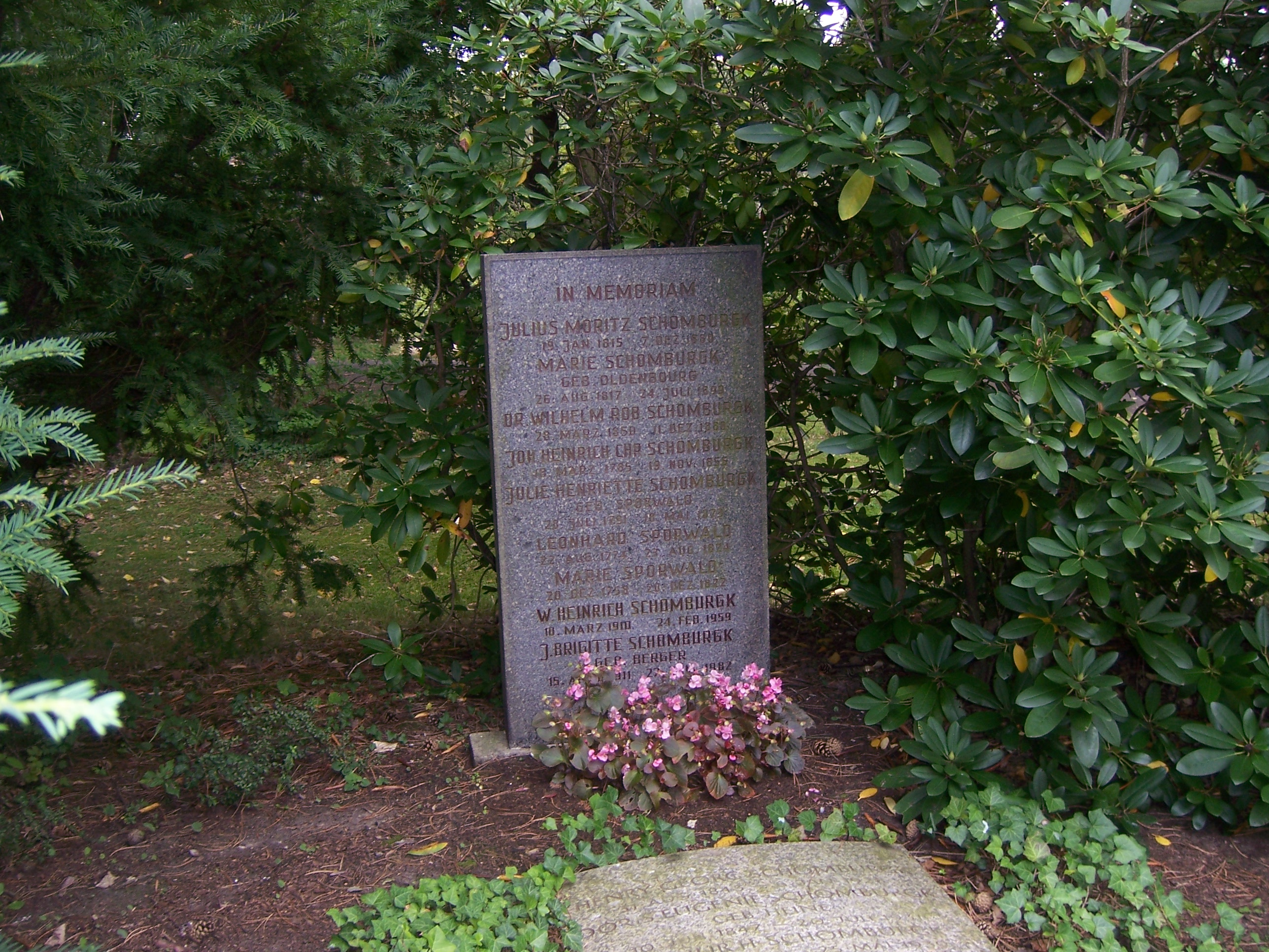 Grabstätte der Familie Schomburgk auf dem Südfriedhof in Leipzig